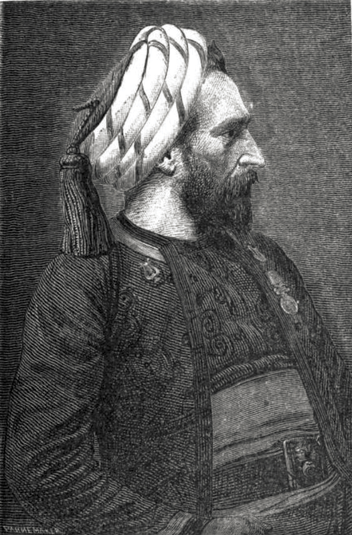 Gravure dans Les Pensées du zouave.